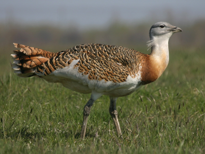 Devavanya, Maďarsko